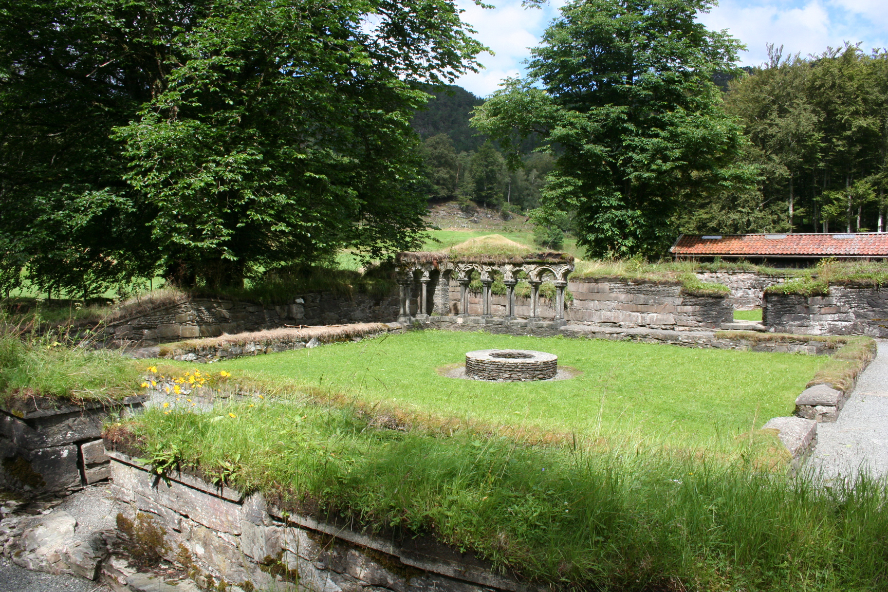 lysekloster gården